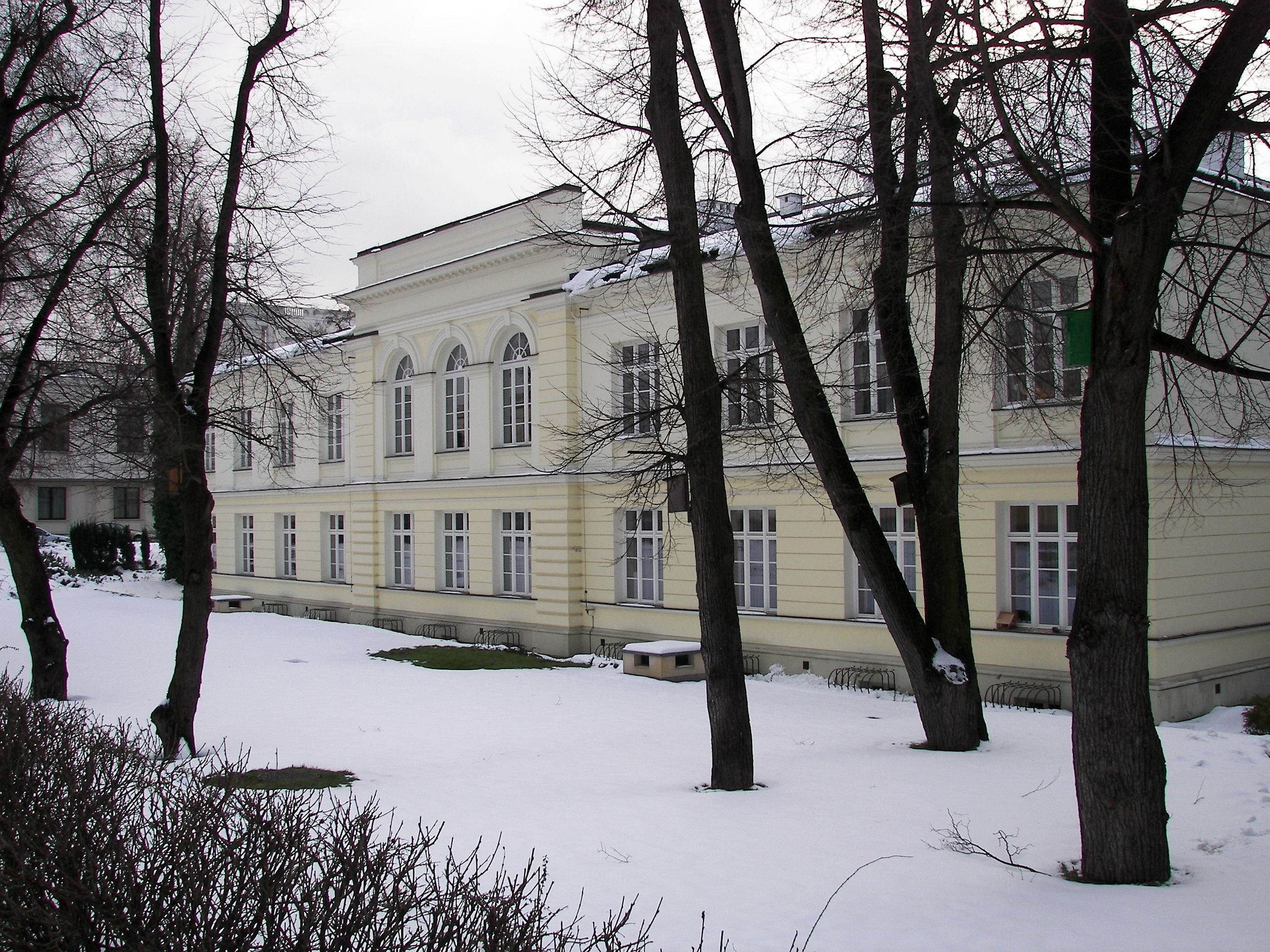 Sejm RP budynek G (pałacyk Komisji Sejmowych)